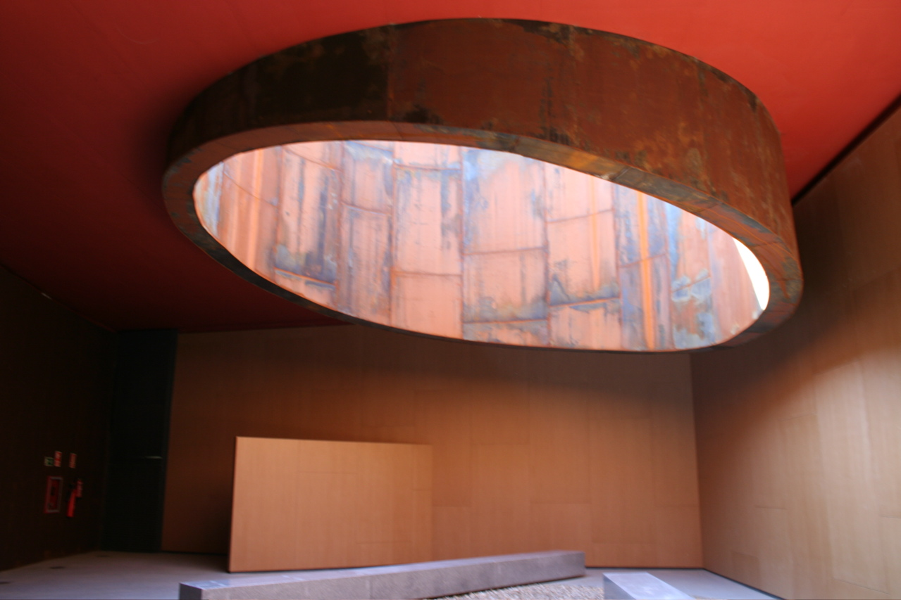 Parte interna del edifico de la galería del museo de la prehistoria de Teverga